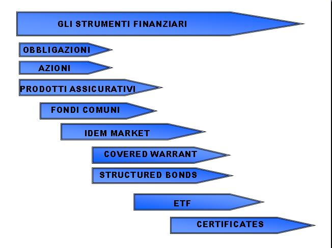 Strumenti finanziaria quotati su borsa italiana